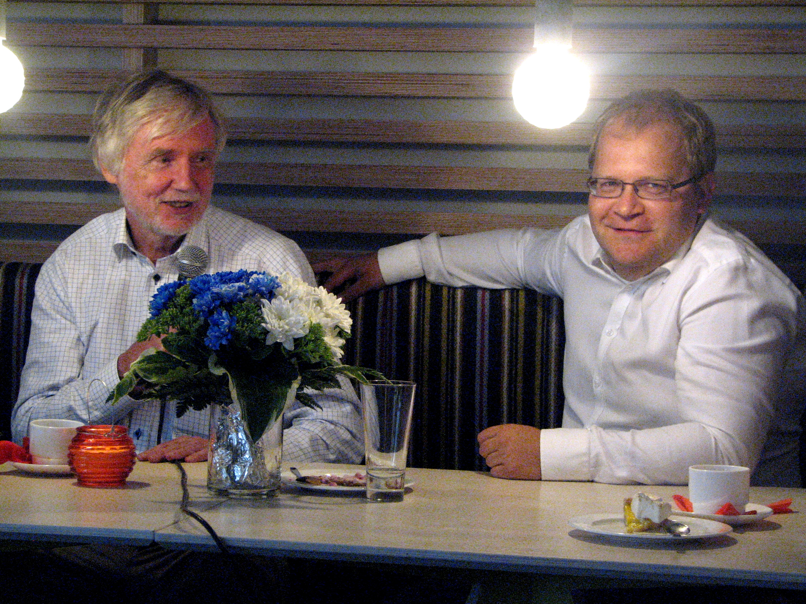 Erkki Tuomioja ja Urmas Paet esinemas V Läänemere ajaloopäeval Kuressaare kohvikus Mosaiik